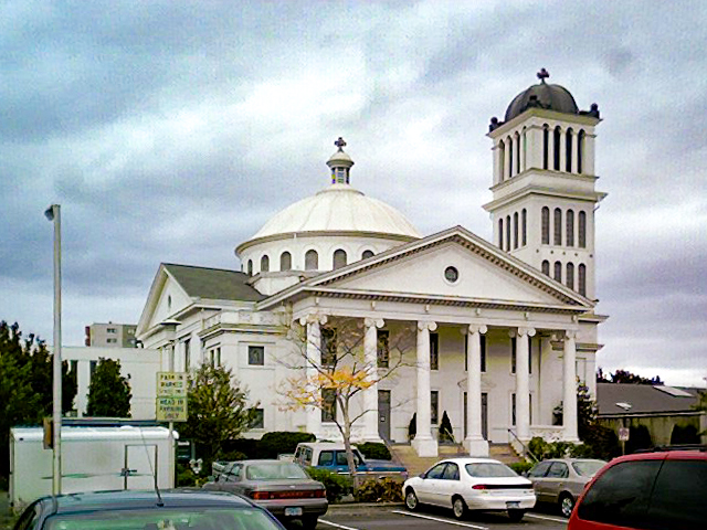 Chiesa, Eugene, Oregon, Usa